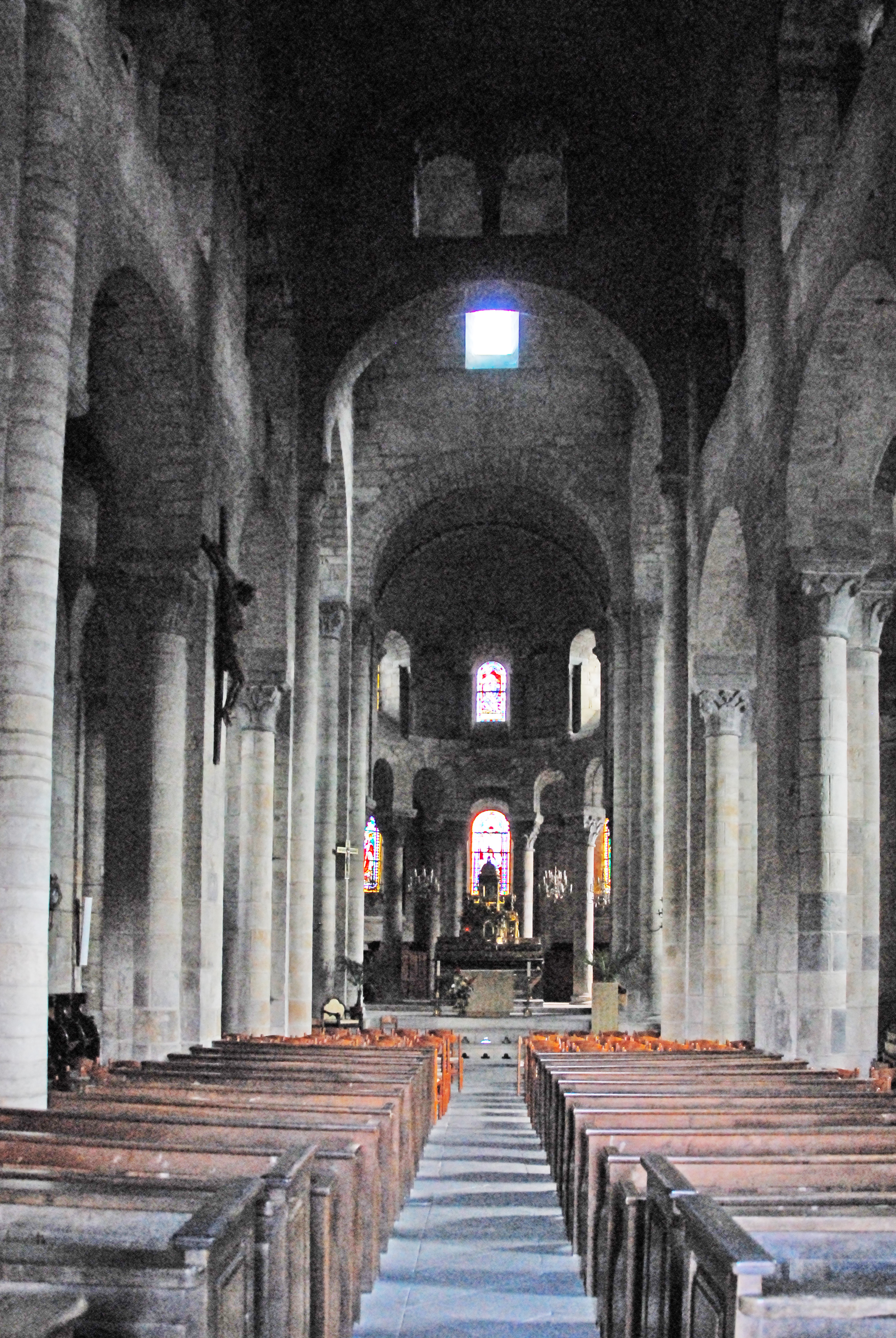 St-Saturnin (Puy-de-Dôme), Mittelschiff z. Chor